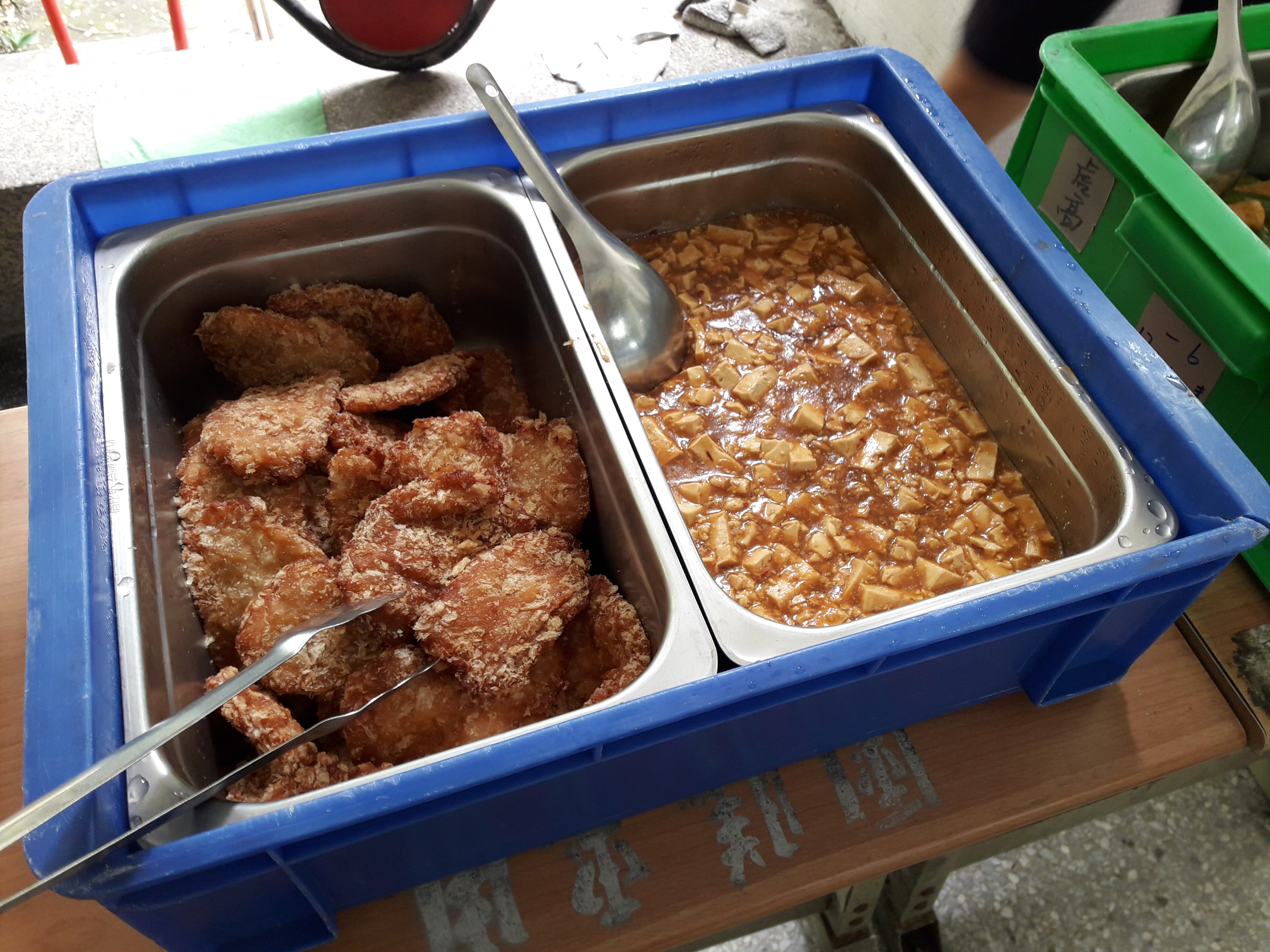 國立虎尾高中2019年8月5日暑期輔導課中午的團膳部分菜色（拍攝班級所供應廠商為味達香）。